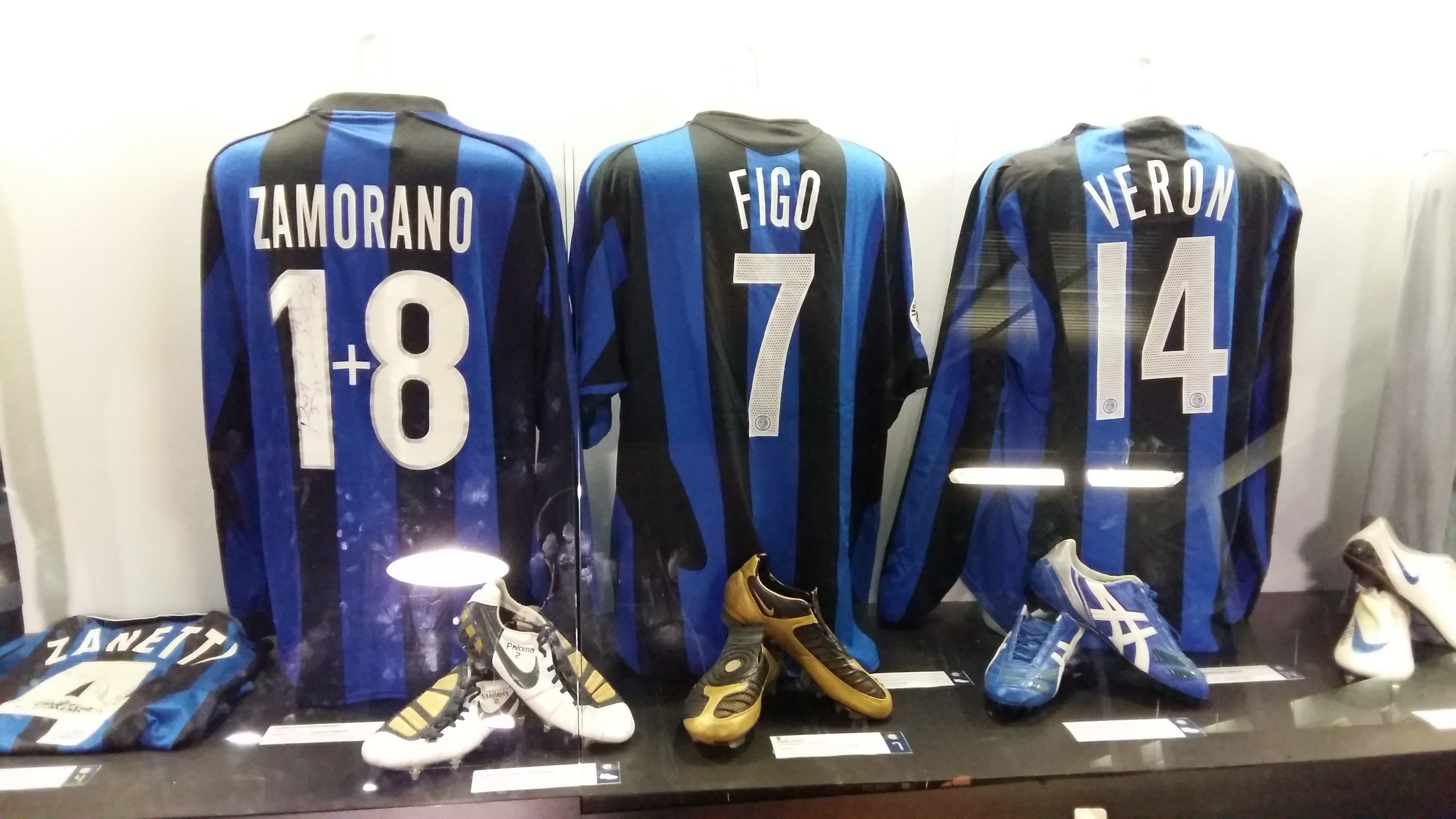 Футболки Хавьера Санетти, Ивана Саморано, Луиша Фигу и Хуана Себастьяна Верона в музее Сан-Сиро.